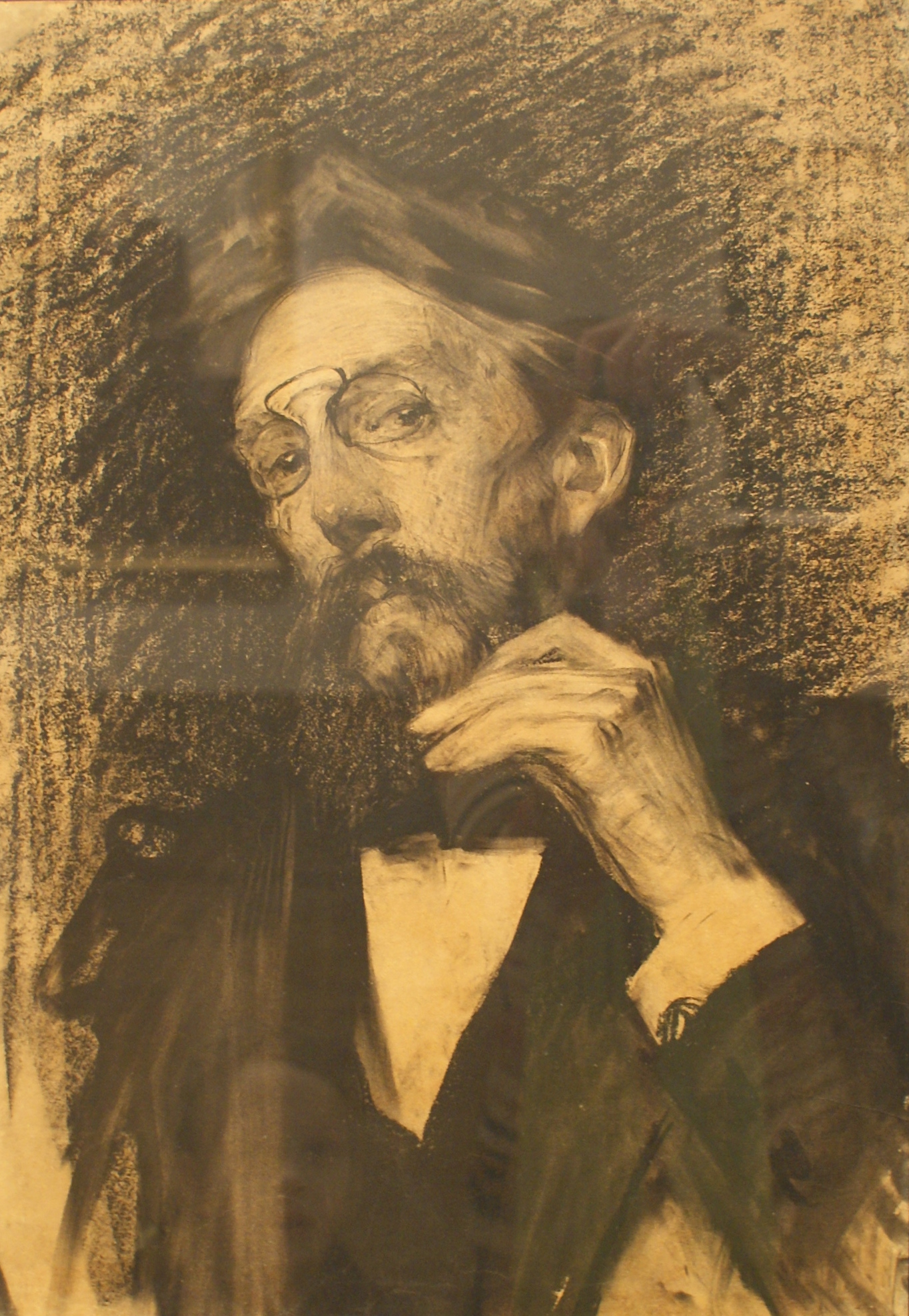 Партрэт Заўялава. Папера, вугаль, соус